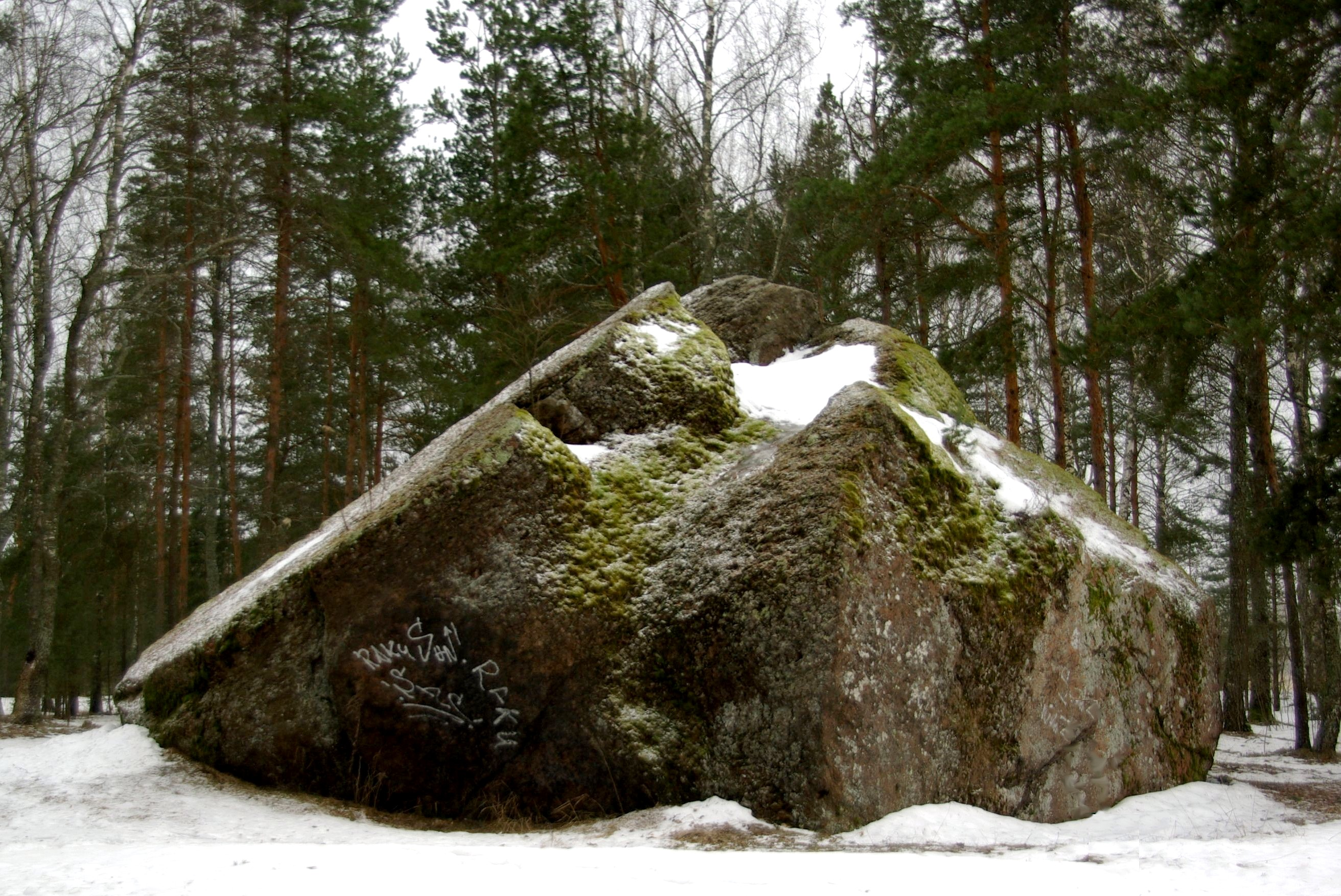 asub Tallinnas Männikul Raku järve ääres